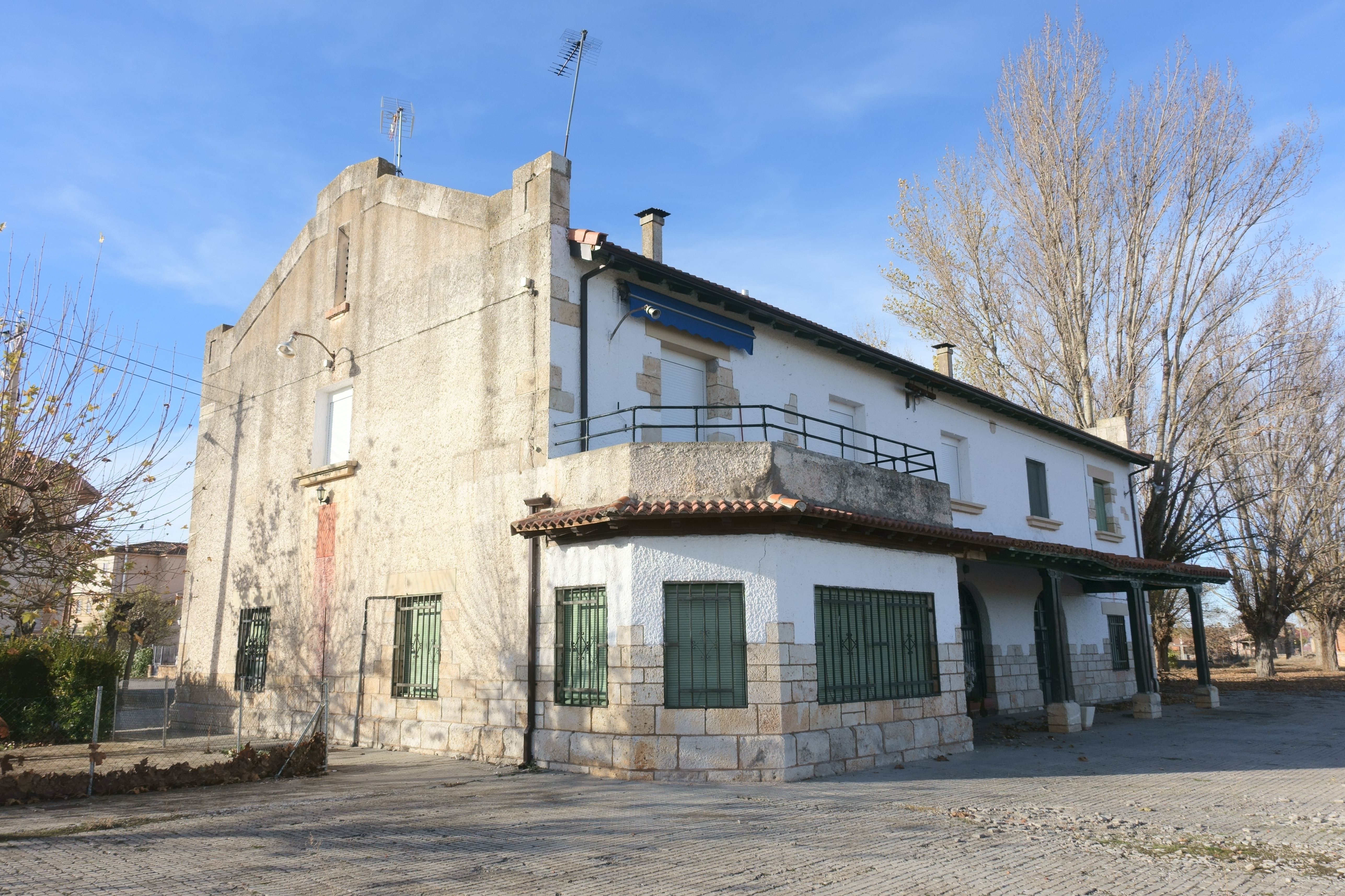 Antiguas instalaciones de la estación de Campo de San Pedro (Segovia, España).